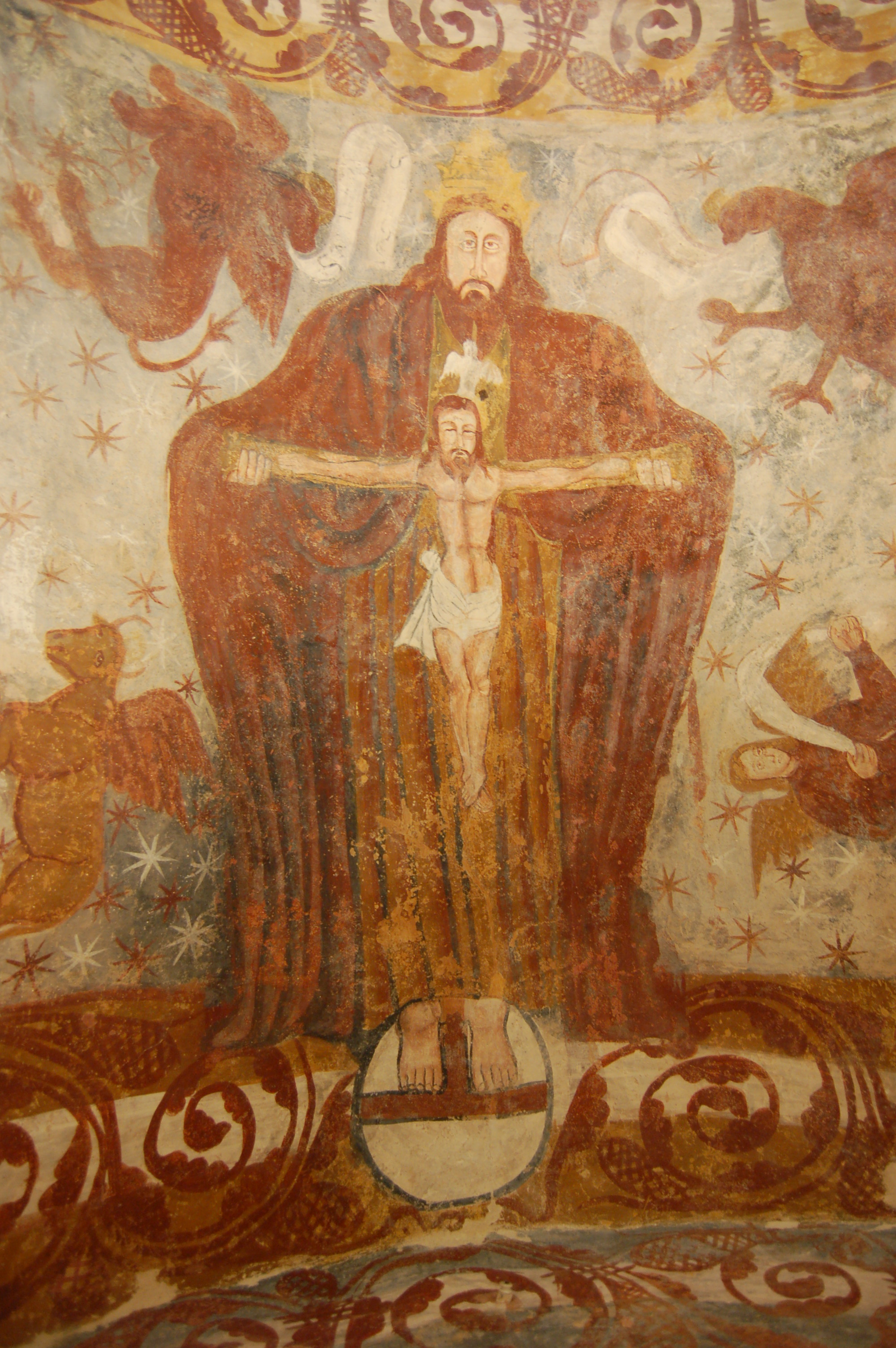 Frescos na igrexa de Santa Comba de Bande